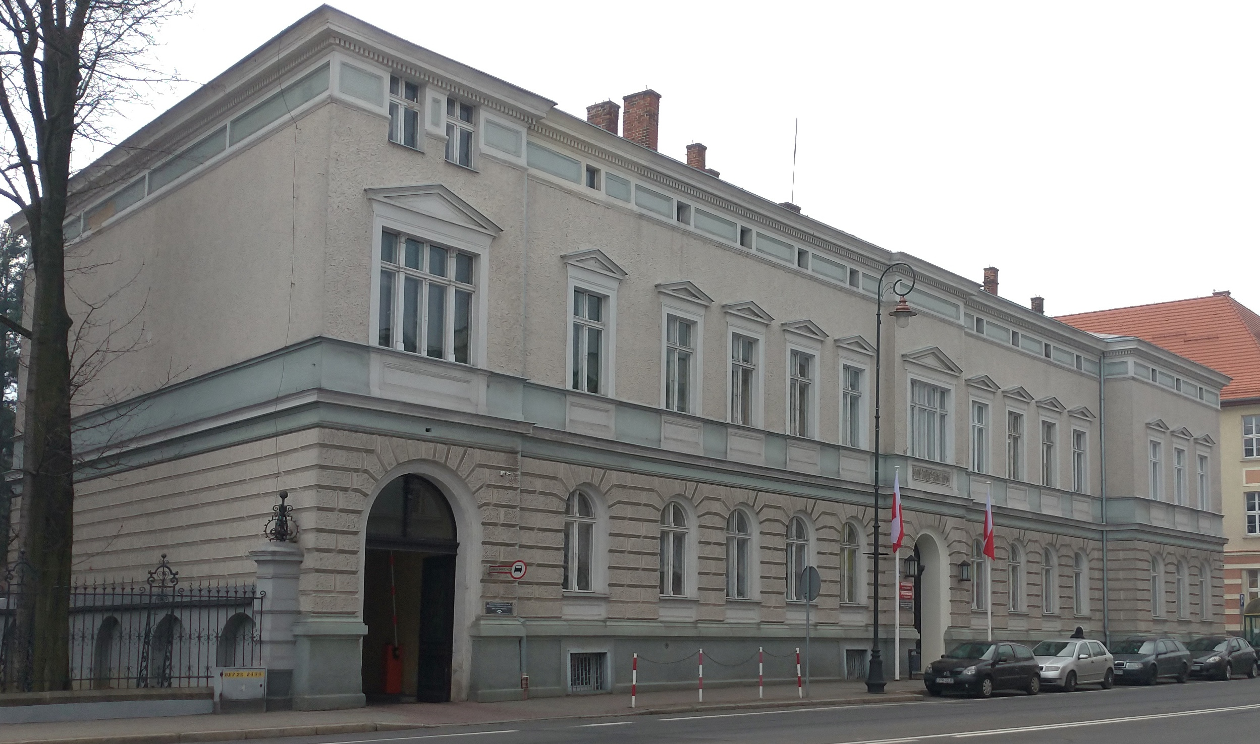 Urząd Miejski w Prudniku.